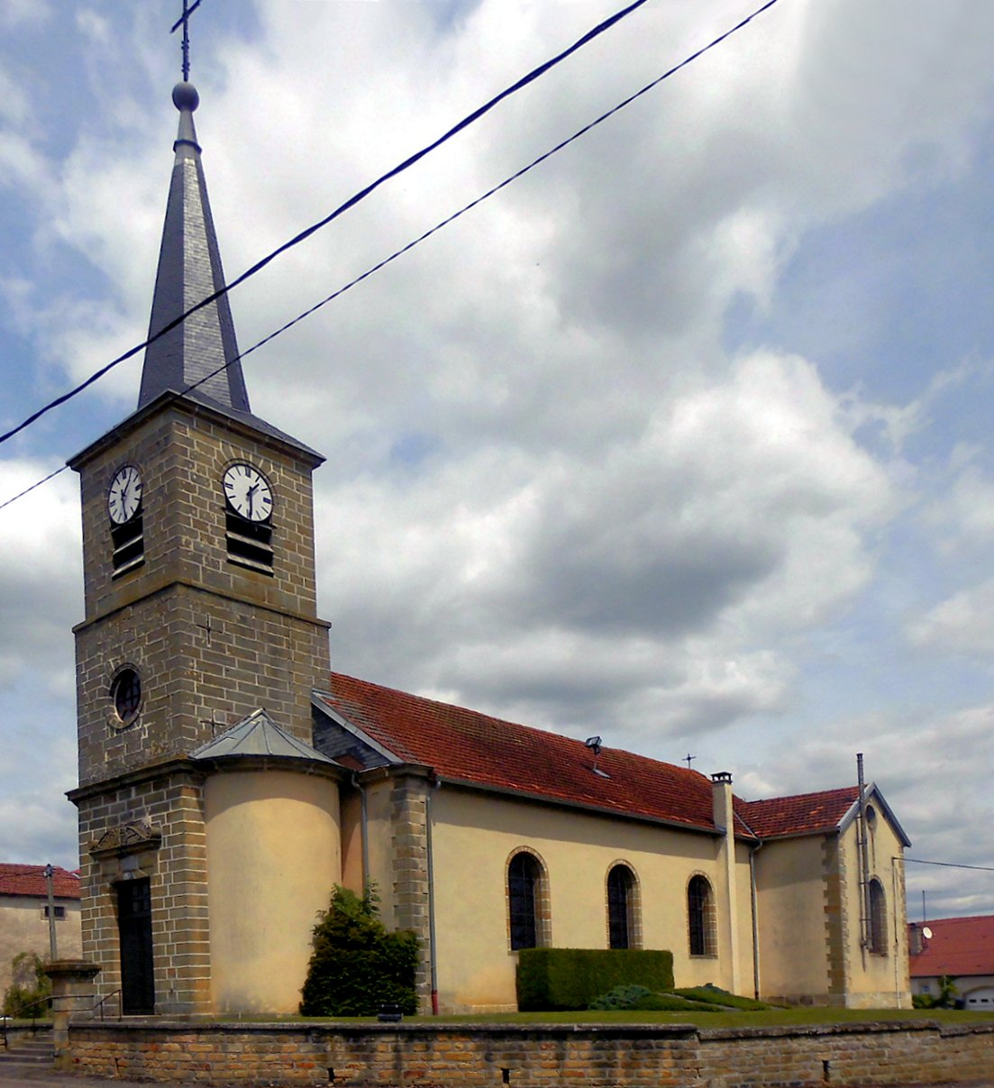 L'église Saint-Barthélemy de Vaudoncourt